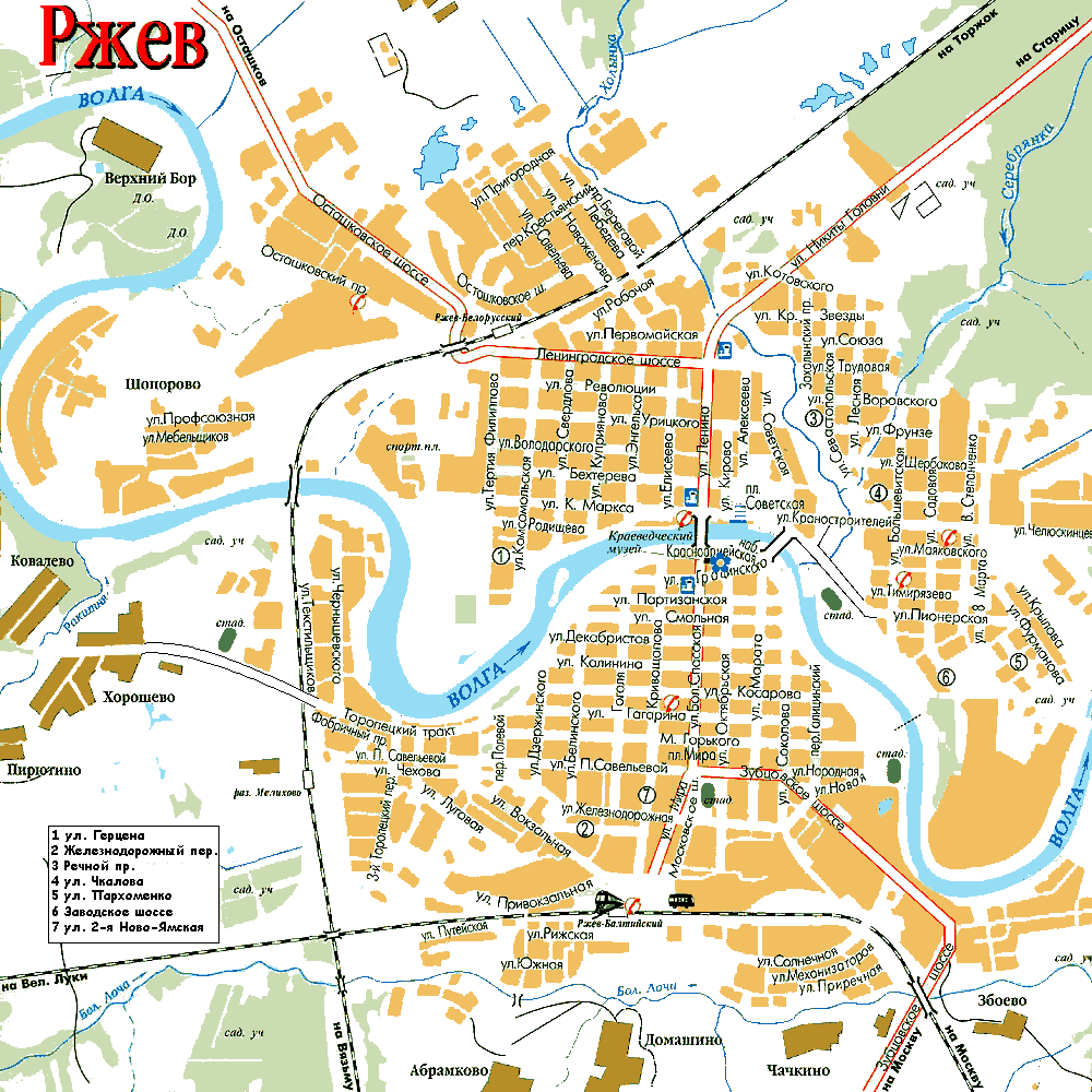 Карта г. Ржева